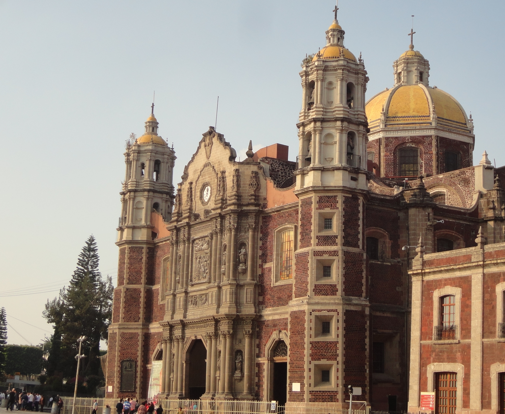 Templo Expiatorio a Cristo Rey (Antigua Basílica de Guadalupe) - La Villa, Ciudad de México.